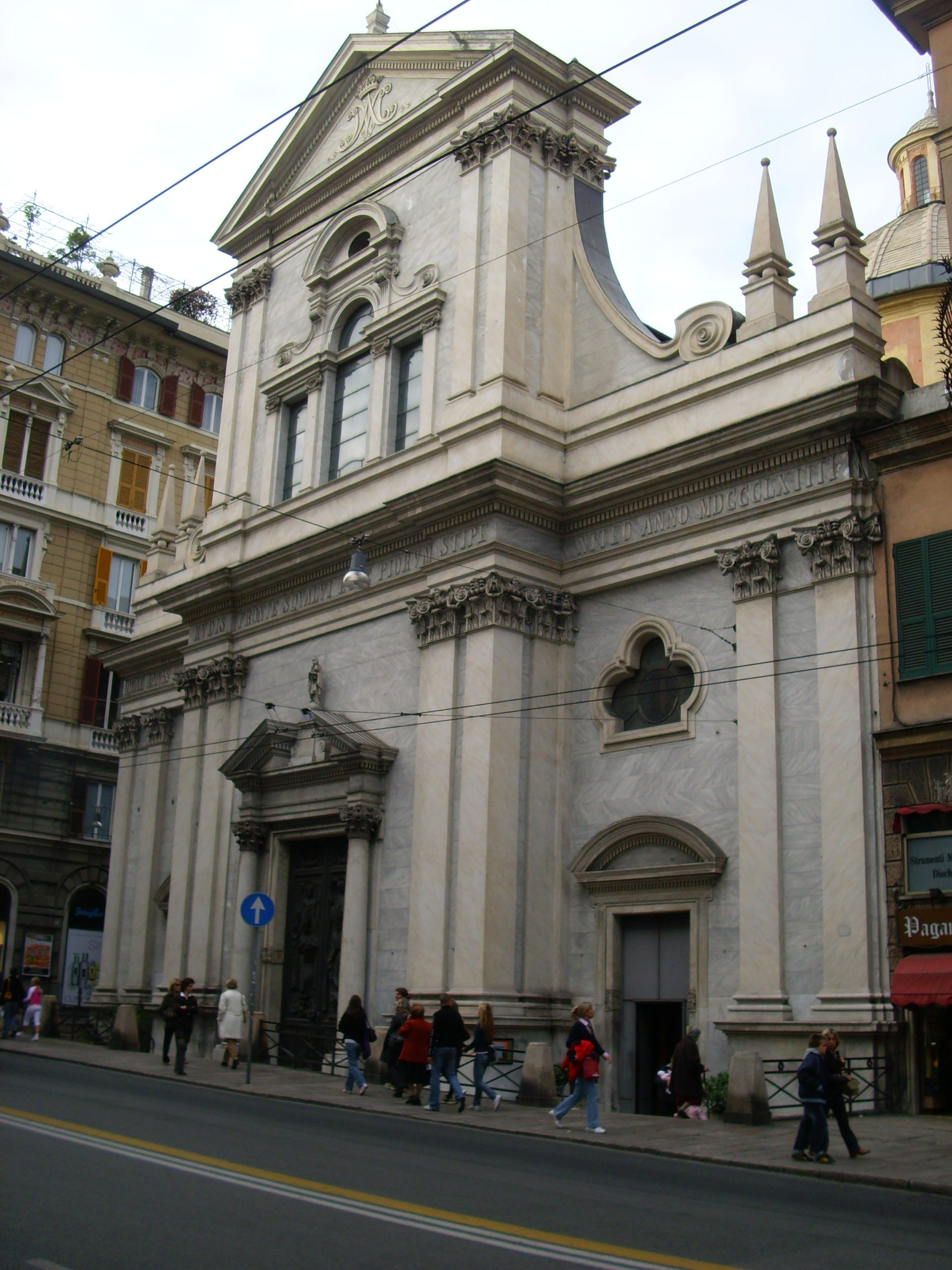 Chiesa della Consolazione, in via XX Settembre, Genova